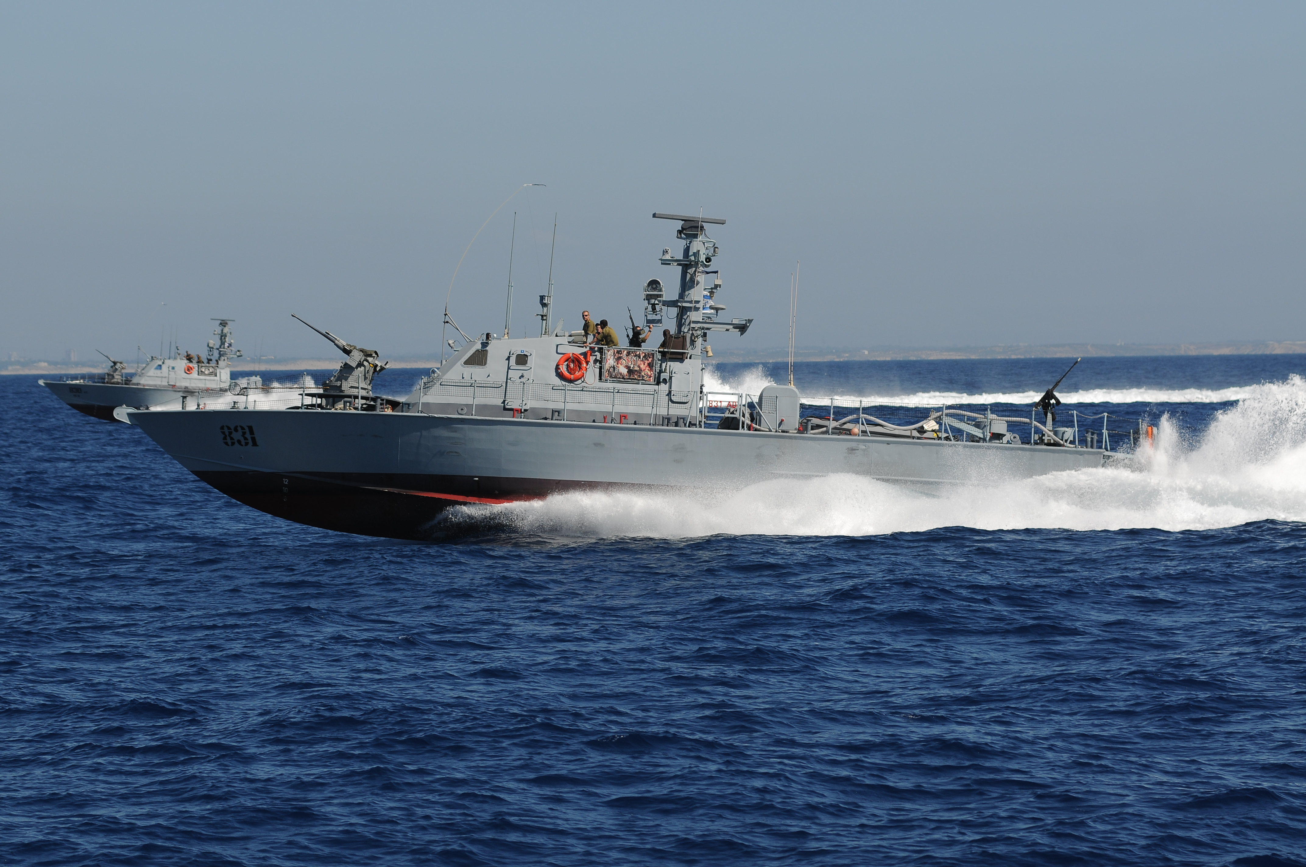 כלי שיט מדגם שלדג בזירה הדרומית